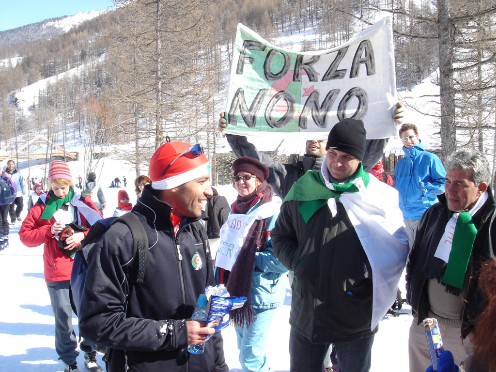 Suporteurs de l'équipe algérienne aux JO de 2006 Turin avec N.M. Bentoumi